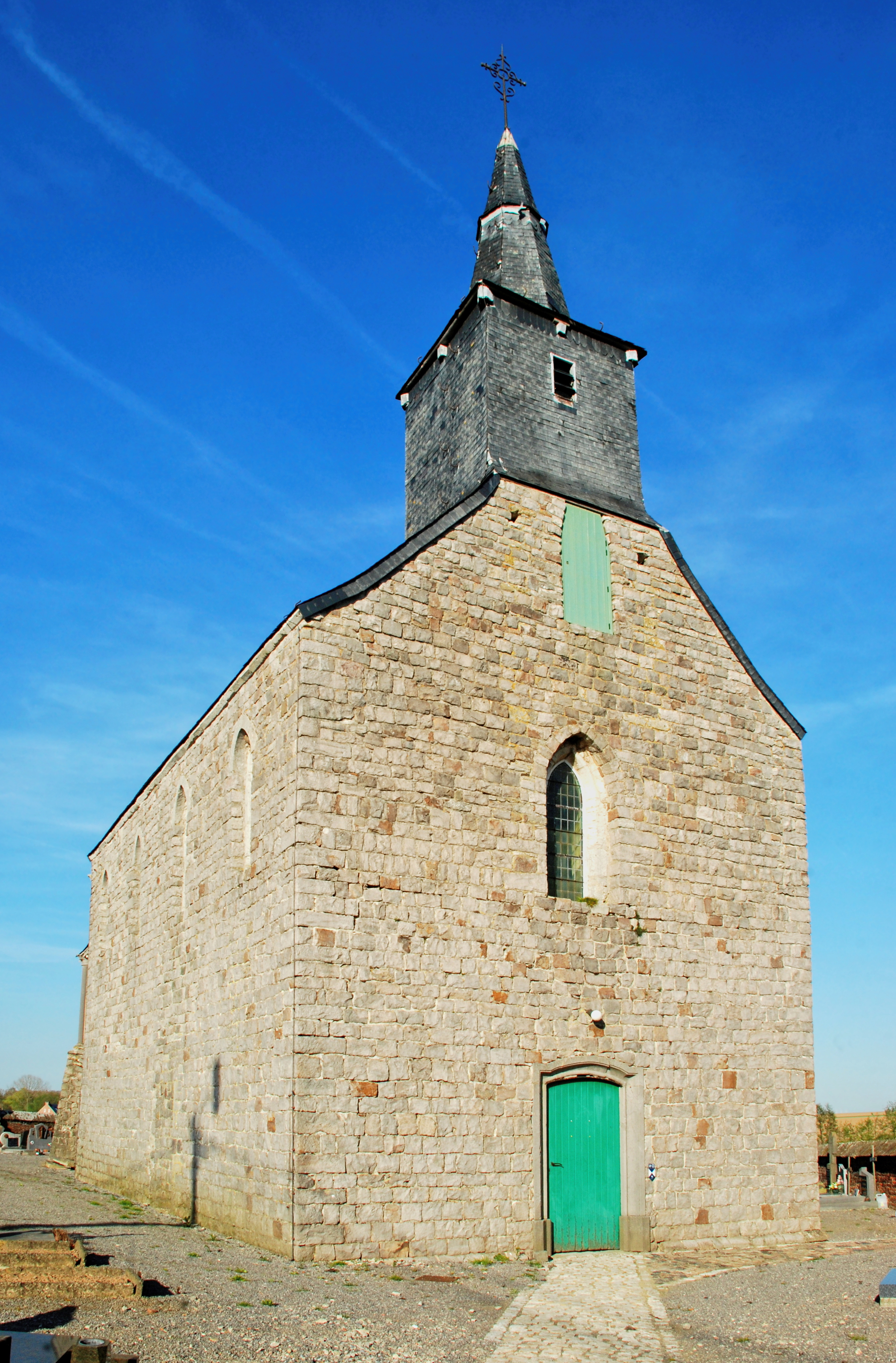 Belgique - Brabant wallon - Jodoigne - Piétrain - Chapelle Sainte-Catherine d'Herbais